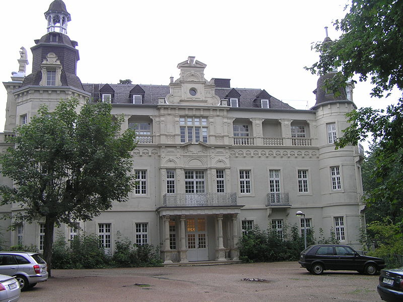 Luxemburgisches Schloss, backside